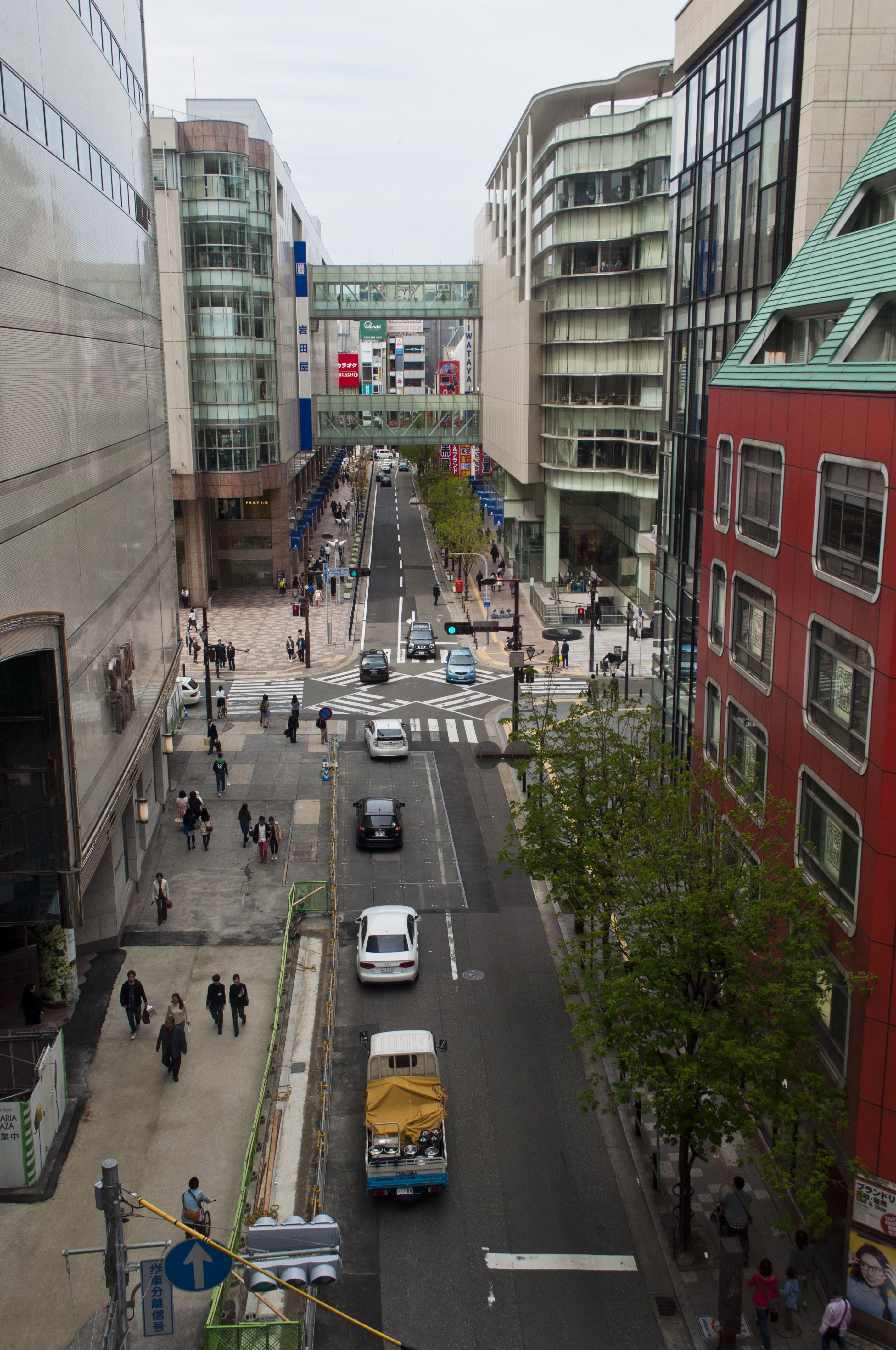 天神バスターミナル側から撮影した「きらめき通り」